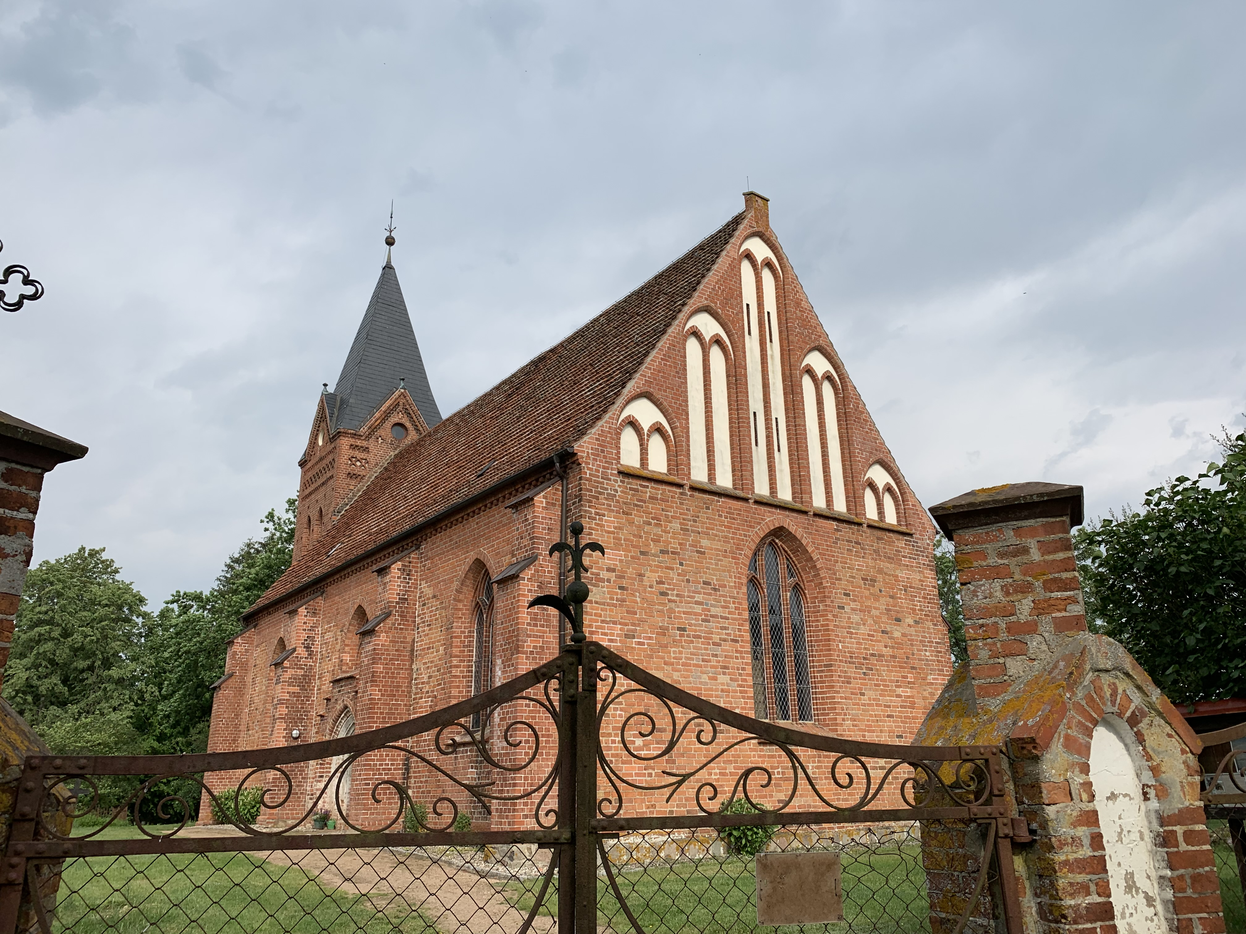 Die Kirche Linstow ist eine Backsteinsaalkirche in Dobbin-Linstow im Landkreis Rostock in Mecklenburg-Vorpommern. Im Innern steht eine neugotische Holzausstattung aus dem Jahr 1871.